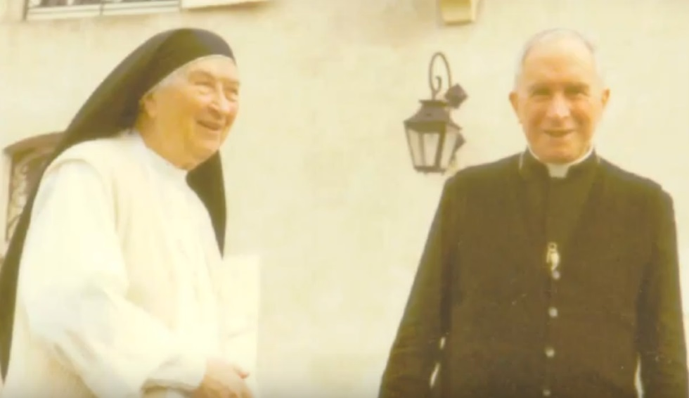 Mère Marie-Gabriel et son frère, Mgr Lefebvre dans les années 1980.